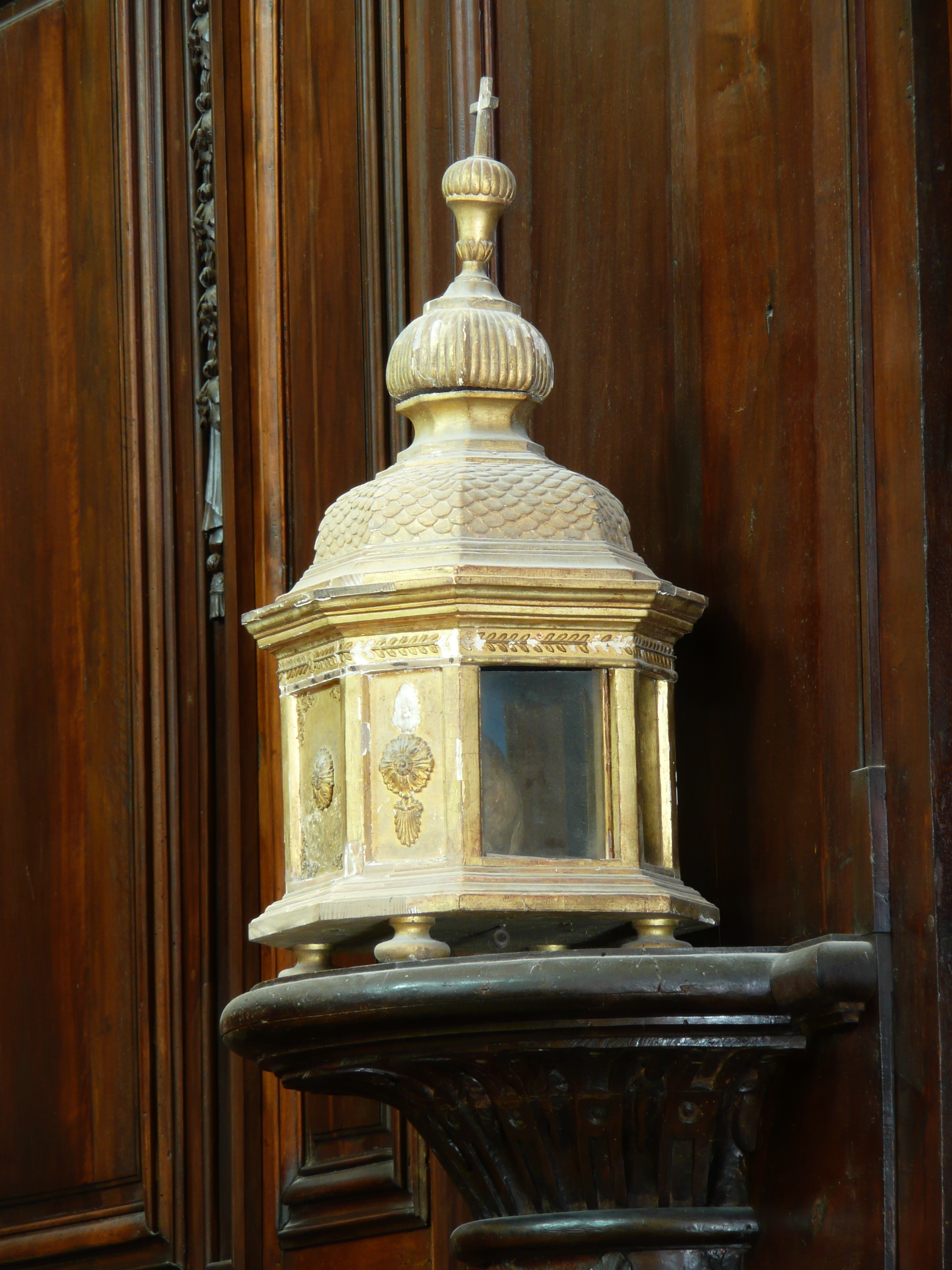 Arles (Bouches-du-Rhône, France), intérieur de l'église Notre-Dame-la-Major, le chœur, sur sa sellette spécialement aménagée, reliquaire de sainte Rusticule, encore dénommée Marcia d'Arles, mère supérieure du couvent de moniales St Césaire d'Arles.